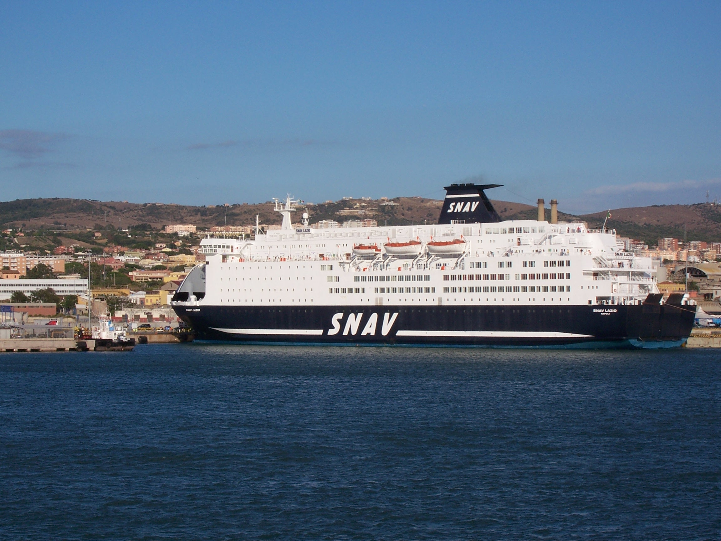 Snav Lazio (ex Olau Britannia) into Civitavecchia Harbour